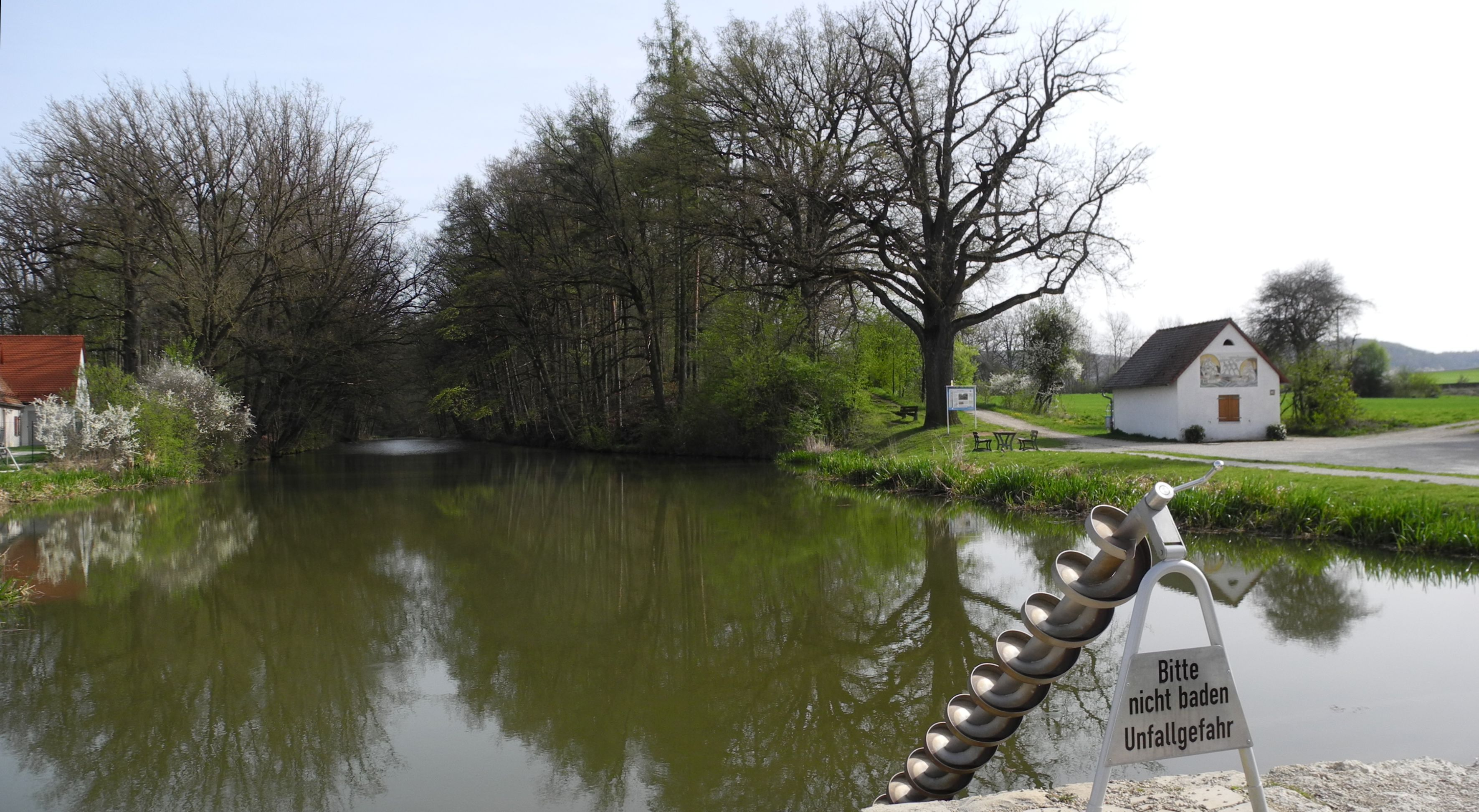 Treuchtlingen-Fossa Carolina-Karlsgraben